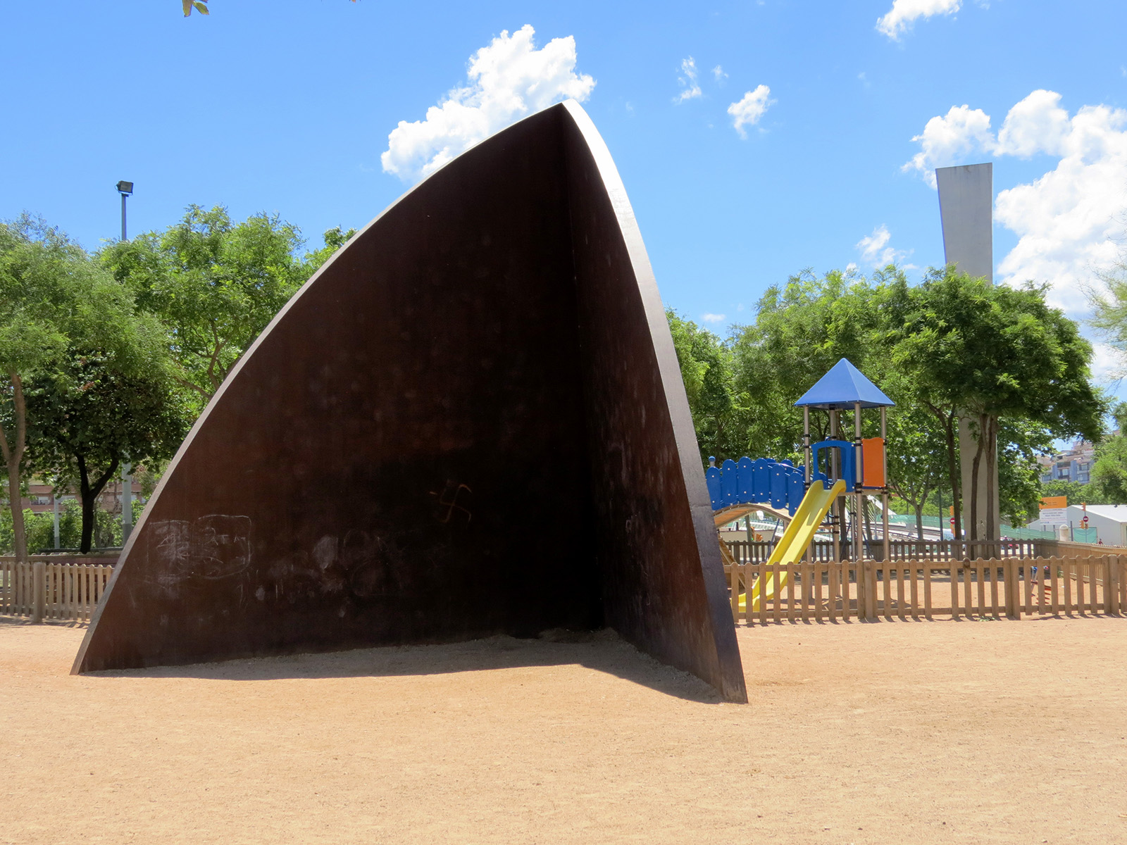 Sense títol (Ellsworth Kelly). Pl. General Moragues (Barcelona)